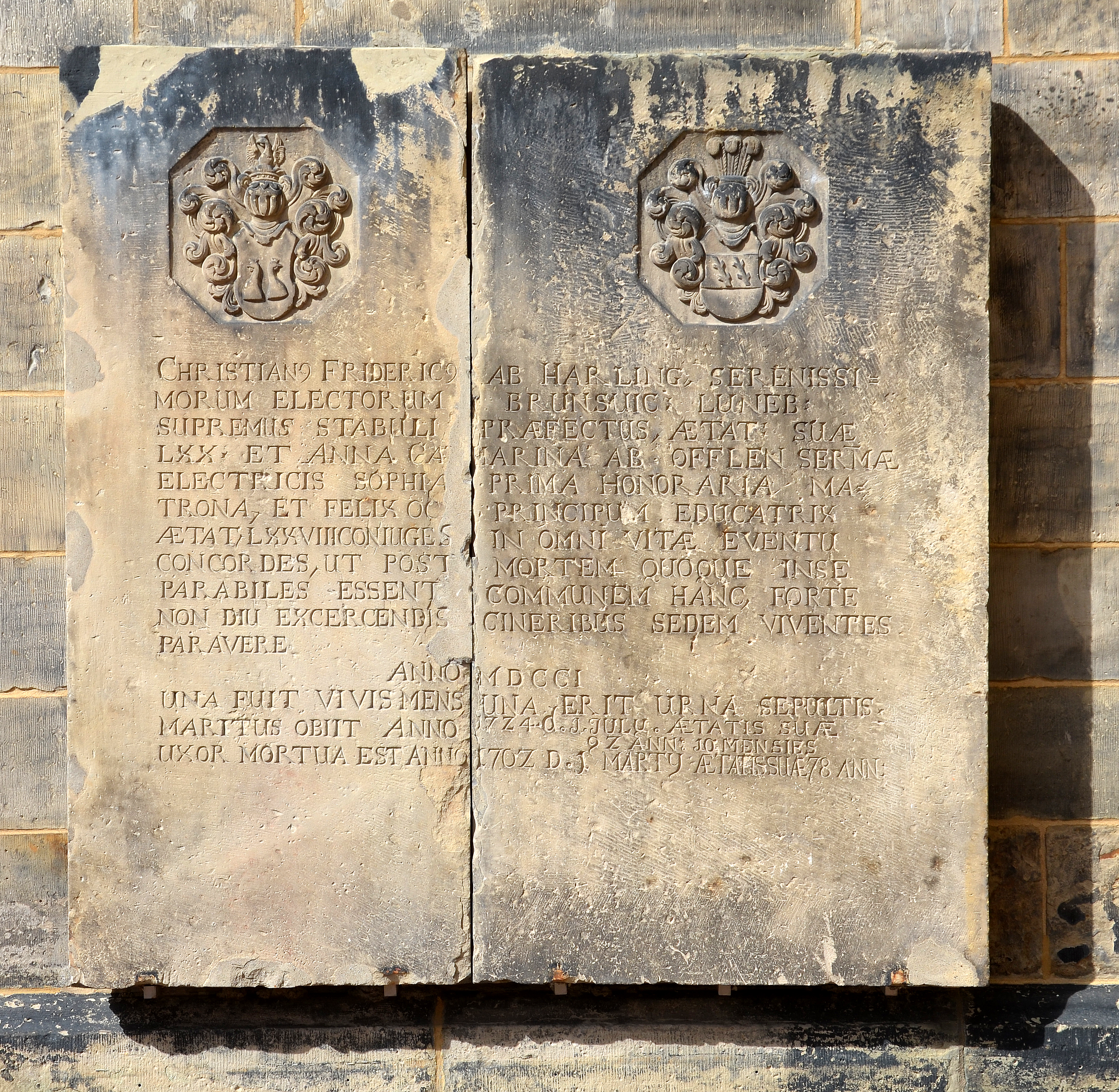 Grabstein (heute Epitaph) an der südlichen Kirchturmmauer der Neustädter Hof- und Stadtkirche St. Johannis in Hannover, Stadtteil Calenberger Neustadt, für den Kurfürstlich Hannoverschen Oberstallmeister Christian Friedrich von Harling (geboren am 21. August 1631 auf Gut Neuenfelde bei Oldenburg (Oldenburg); gestorben am 4. Juli 1724 in Hannover), sowie dessen Ehefrau Anna Catharina von Offen ...